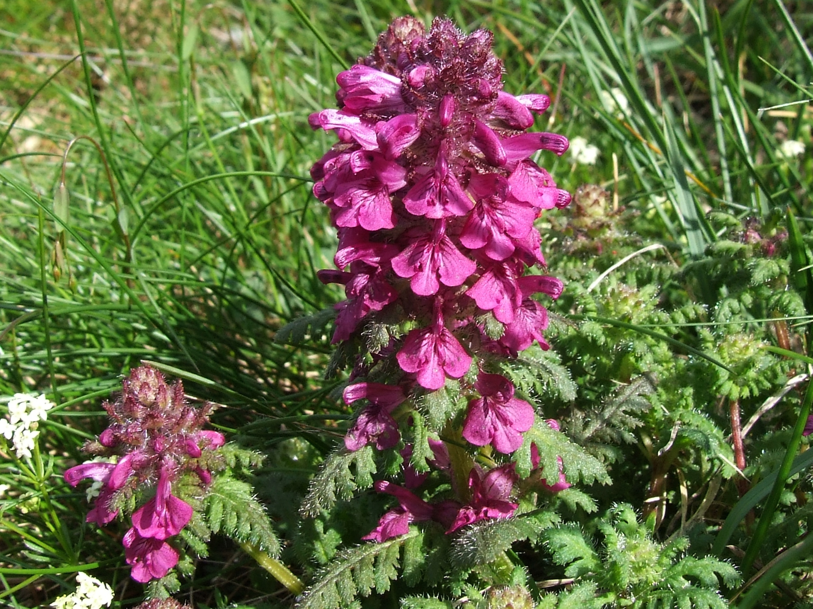 Pedicularis verticillata (habitat:West Tatra Mountains)